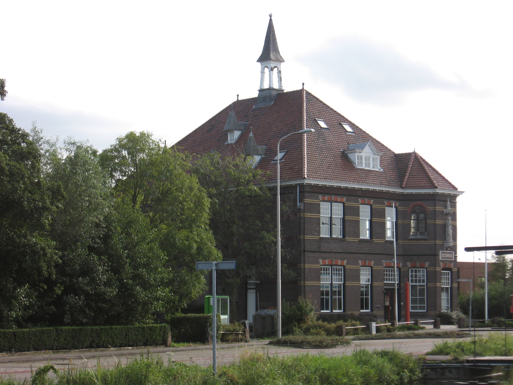 Jozefhuis (Nootdorp). Veenweg 34. Kapel in parochiehuis, voormalig St.Josephgesticht..